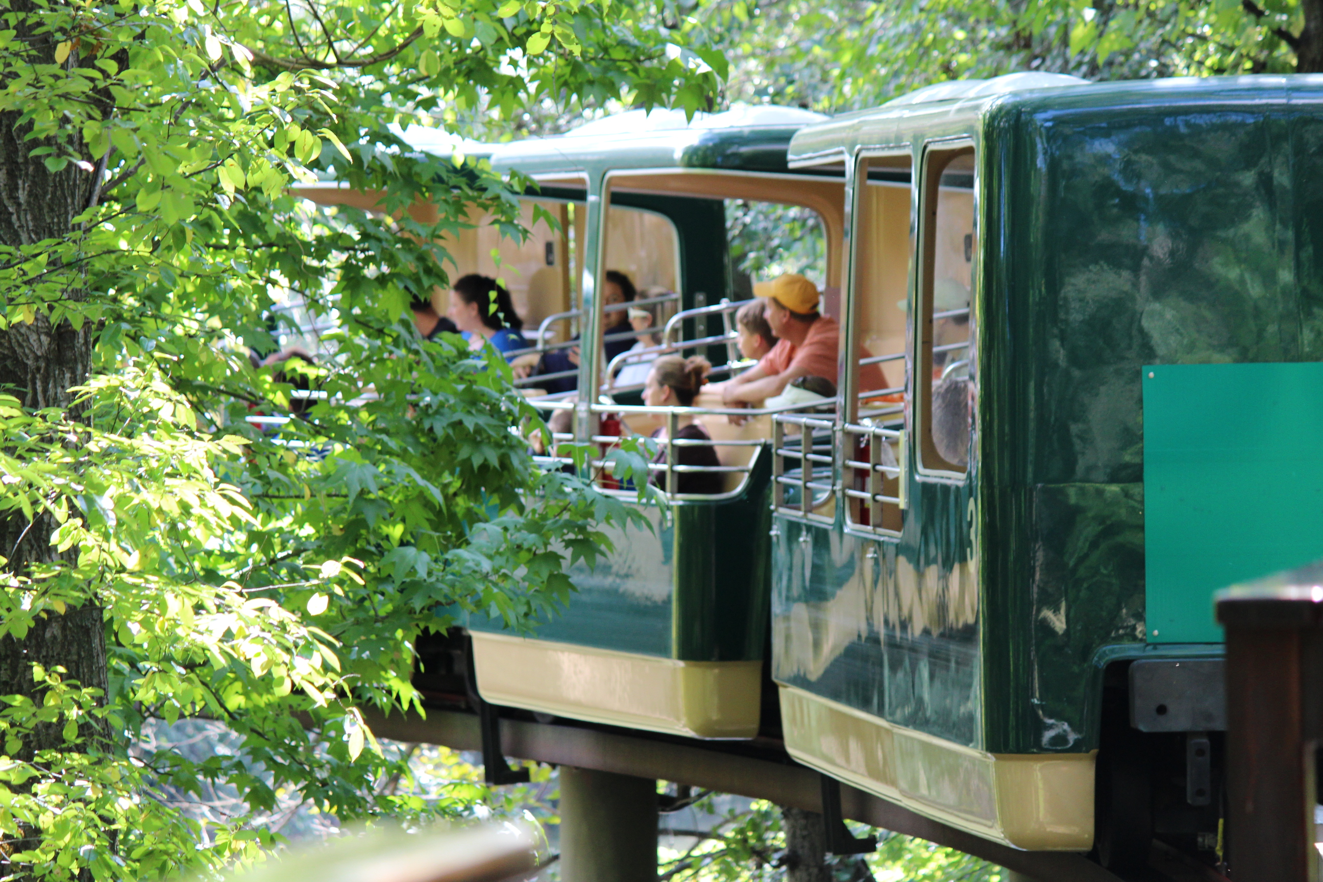 Bronx Zoo